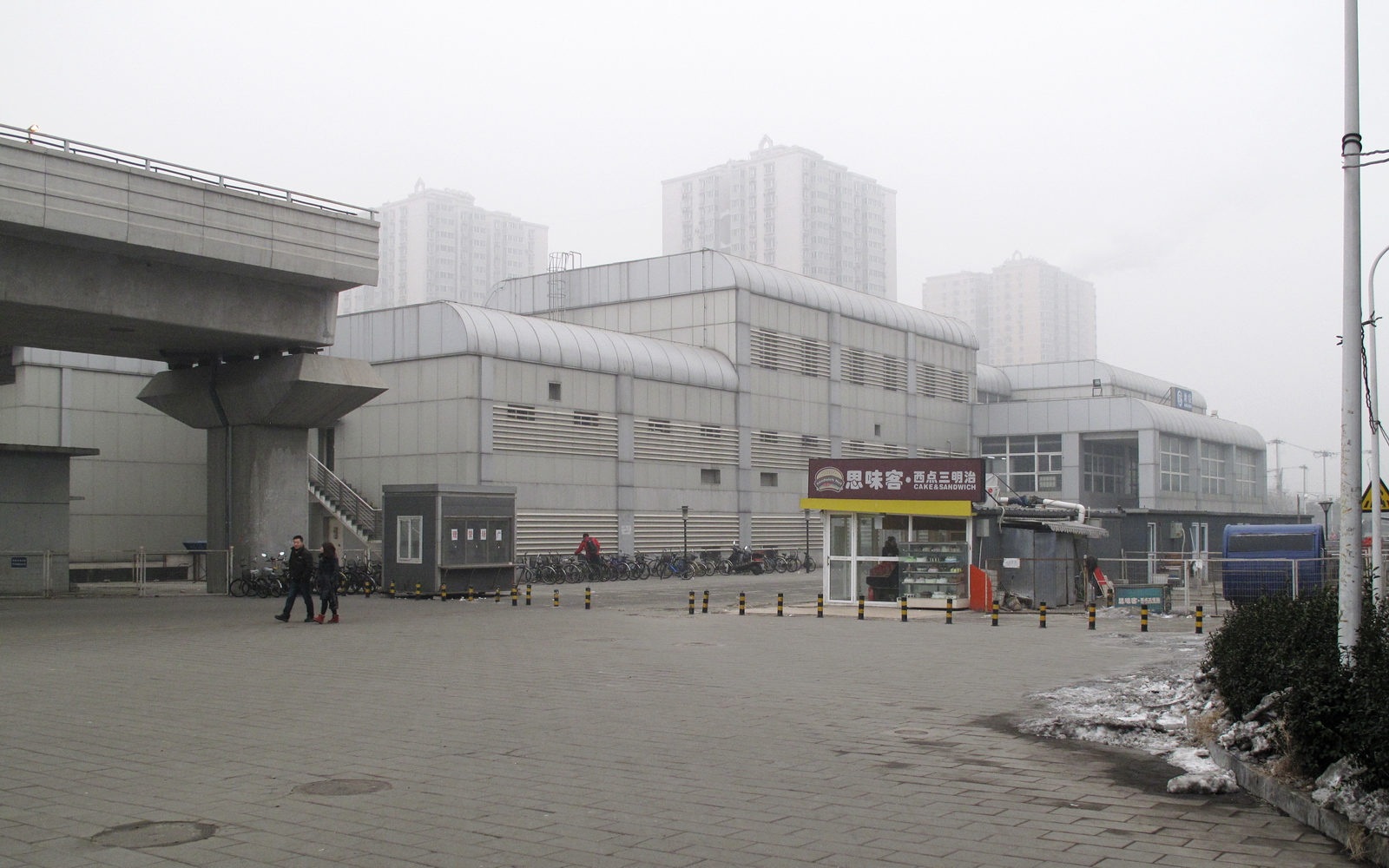 原北京地铁13号线西二旗站，在13号线和昌平线的换乘车站建成后废弃。